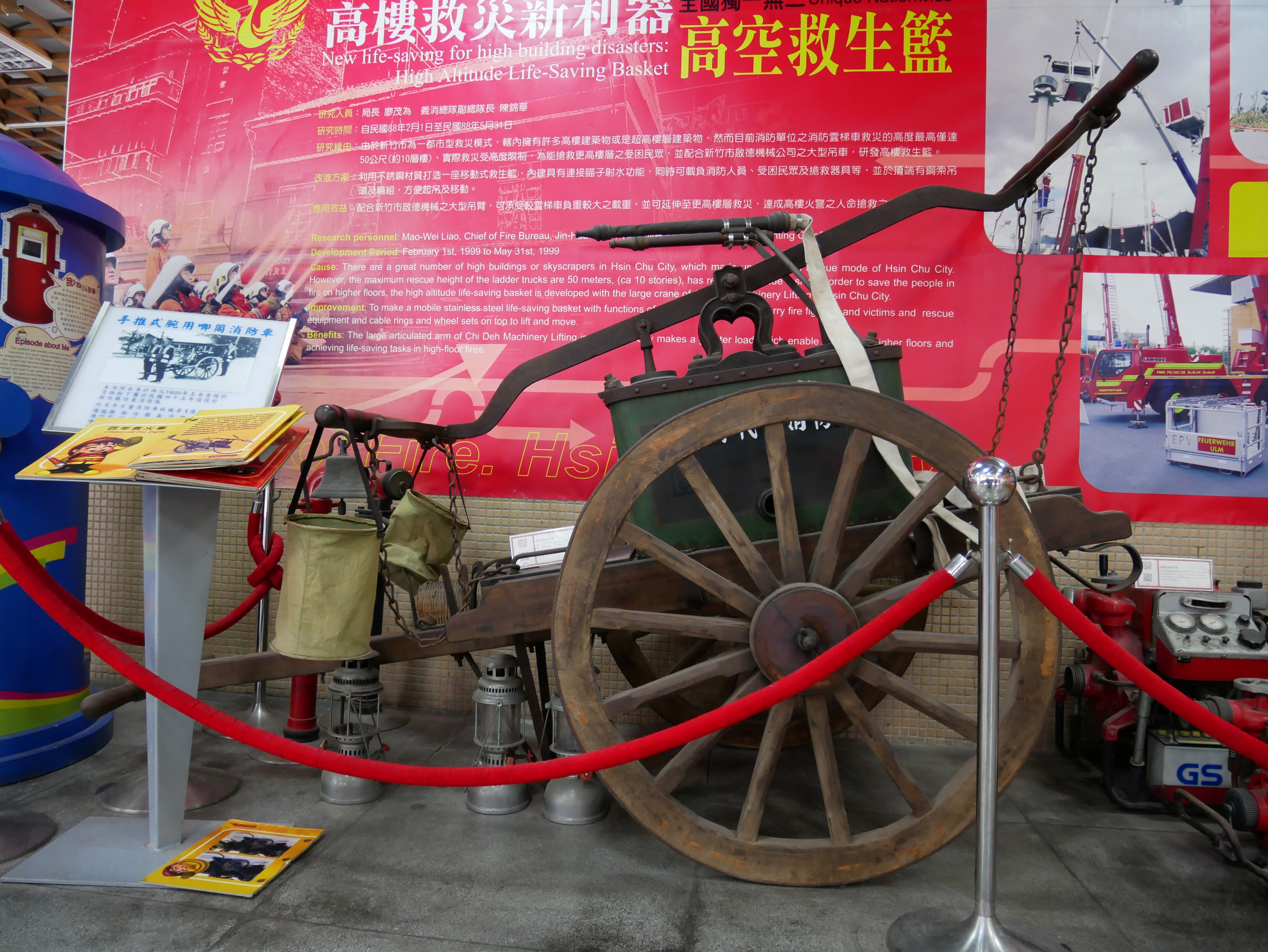 中文（台灣）: 芎林壯丁團手推式腕用消防車，新竹市北區北門聯里大同里